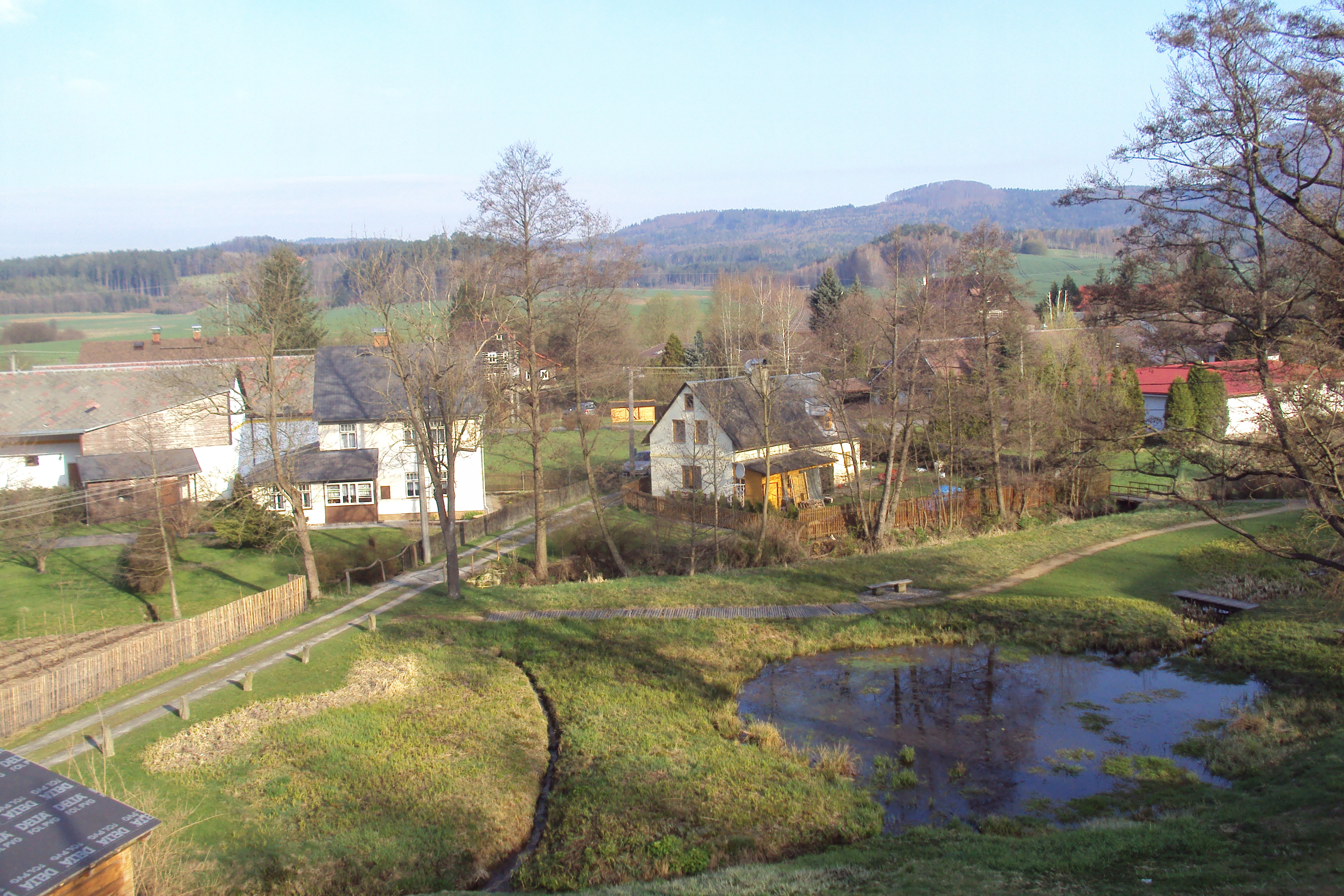 Radvanec shora ze silnice od Maxova